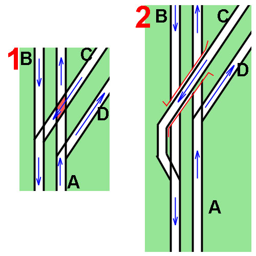 Zelf gemaakt